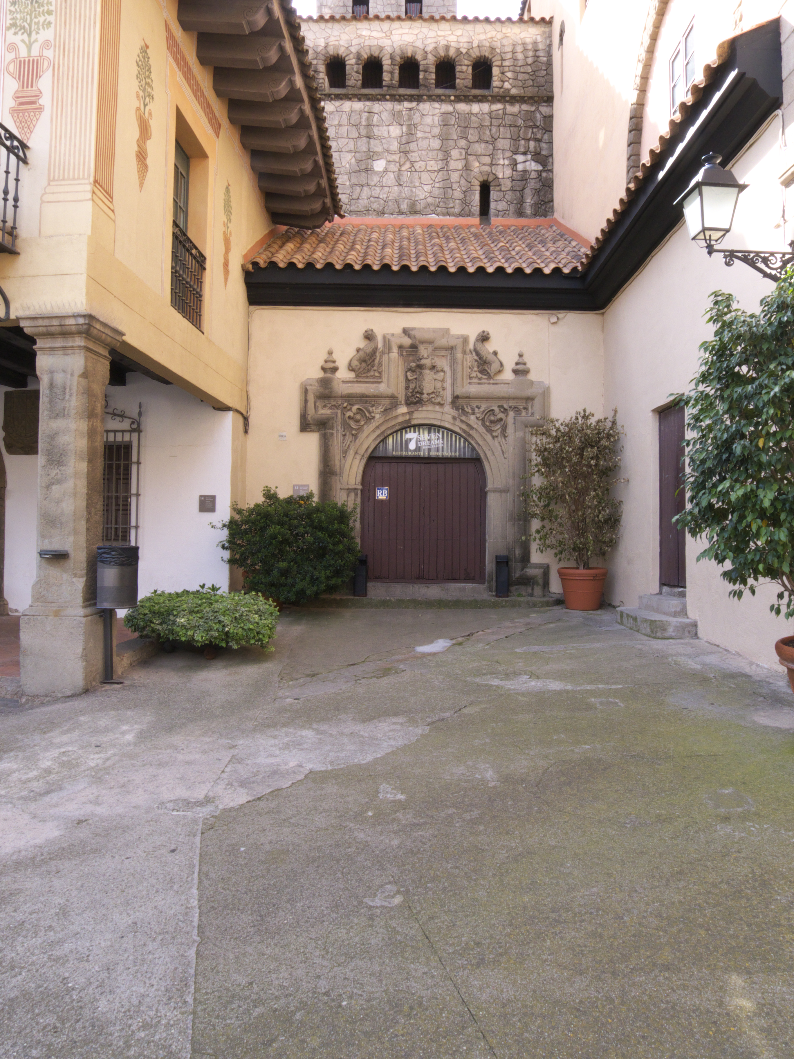 Portada del siglo XVII